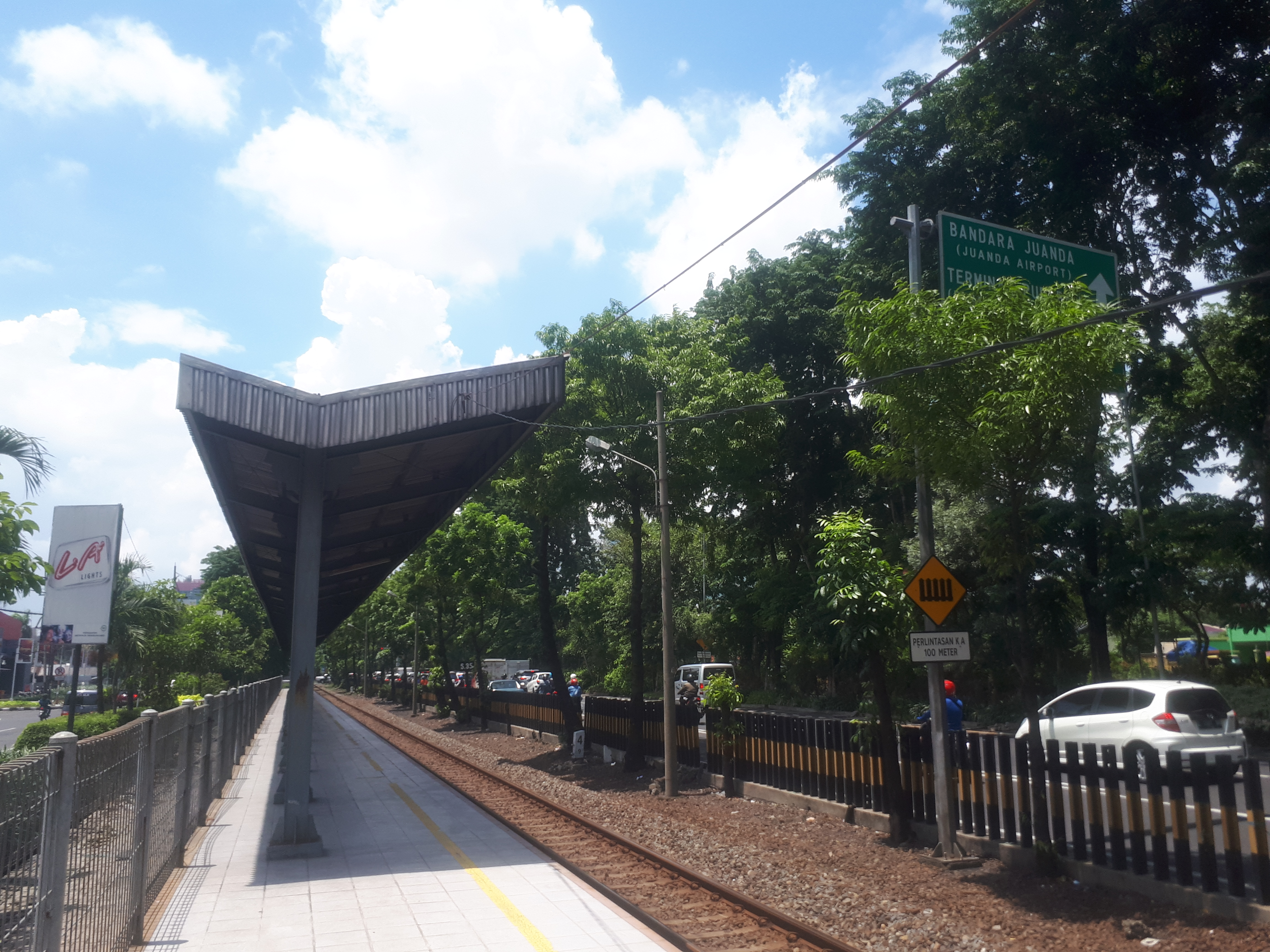 Tampak luar Halte Margorejo tahun 2020